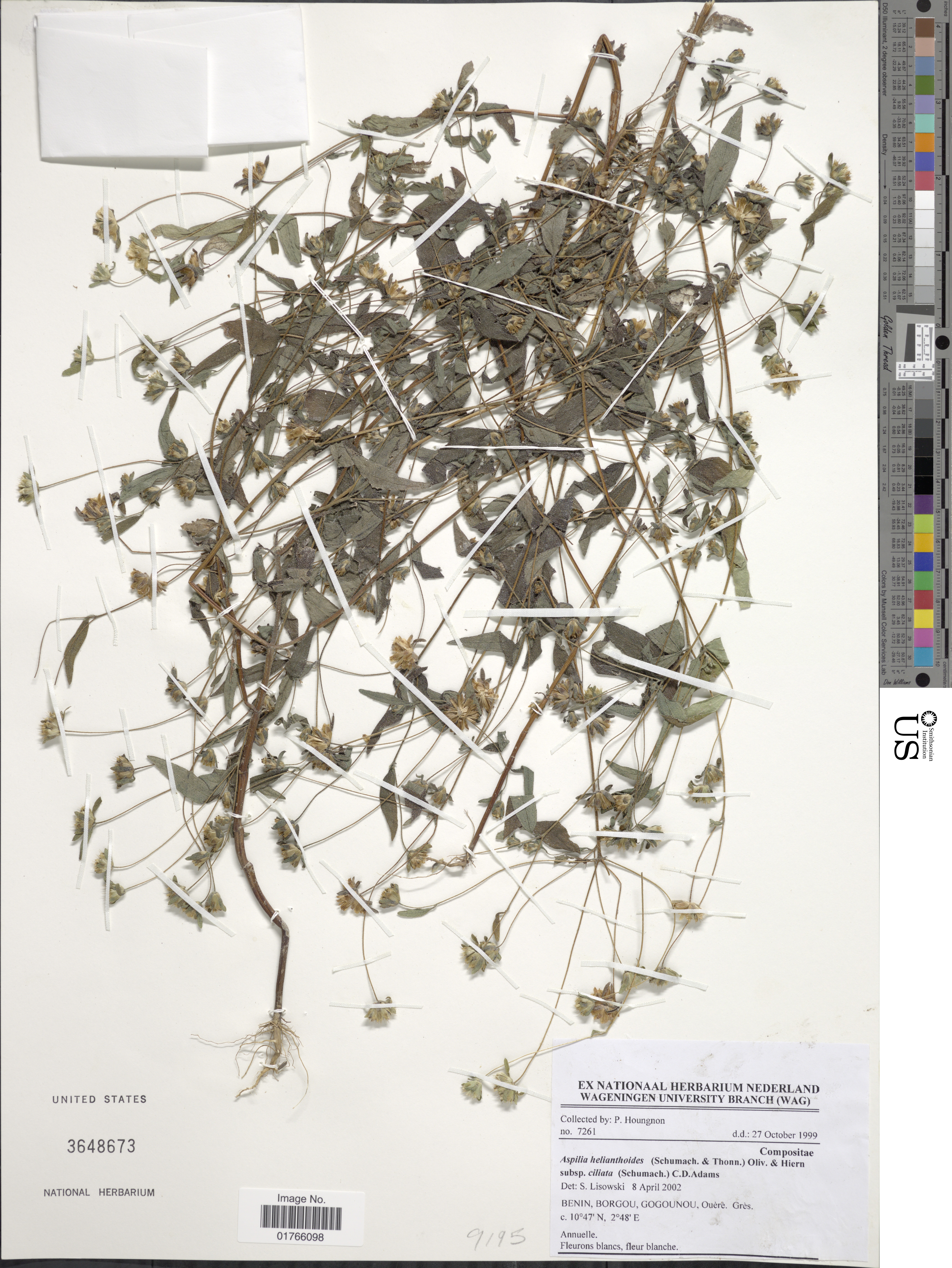 Aspilia helianthoides Object Details Biogeographical Region 22 - West Tropical Africa Collector P. Hougnon Record Last Modified 4 Aug 2017 Specimen Count 1 Collection Date 27 Oct 1999 Barcode 01766098 USNM Number 3648673 Place Gogounou, Ouere, Gres., Borgou, Benin, Africa Published Name Aspilia helianthoides Taxonomy Plantae Dicotyledonae Asterales Asteraceae Asteroideae NMNH - Botany Dept. Record ID nmnhbotany_12816539 Usage of Metadata (Object Detail Text) CC0 GUID (Link to Original Record)